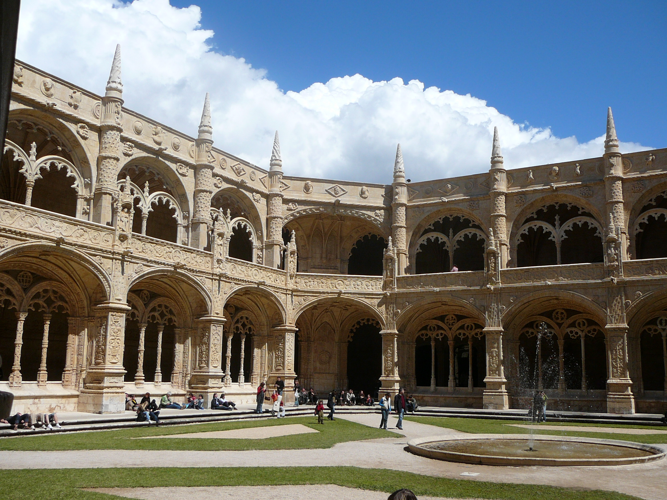 kláštor Mosteiro dos Jerónimos, Lisabon